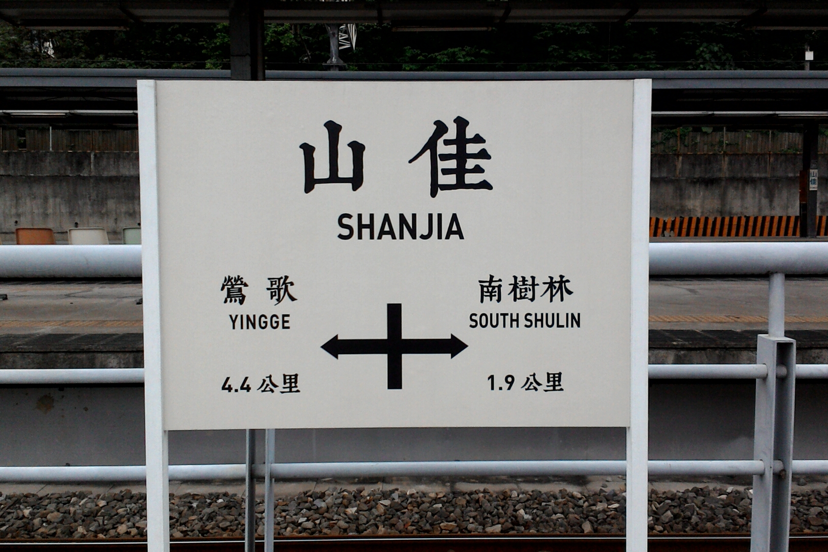 台鐵山佳車站舊站房旁的站名牌,新北市樹林區中山里